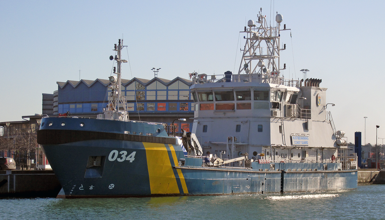 KBV 034 på besök i Ystad 18 mars 2015.